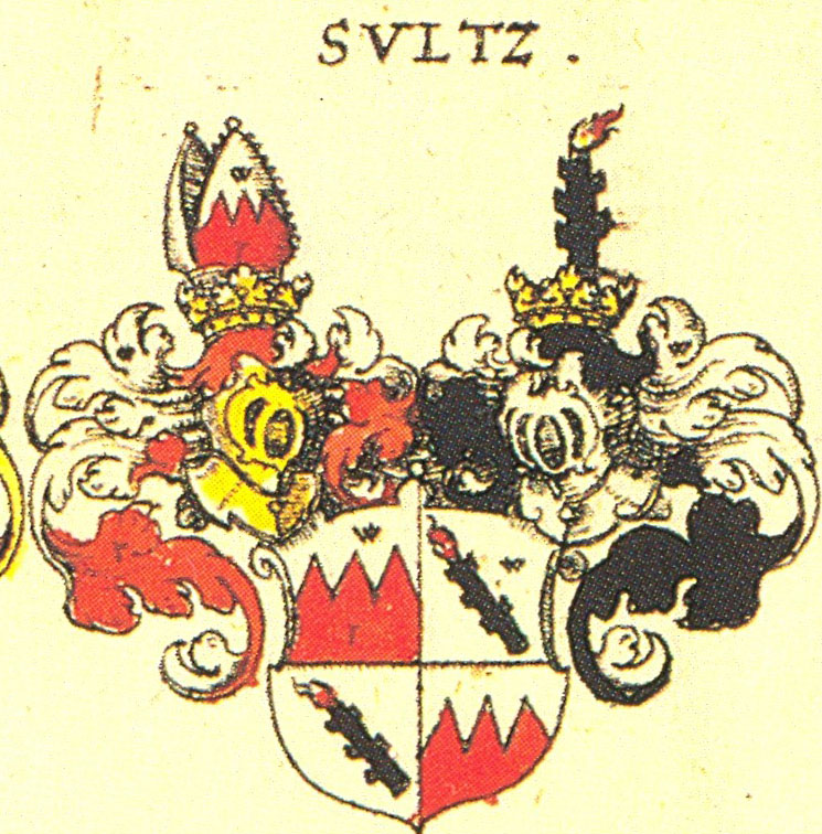 Johann Siebmacher: New Wappenbuch Grafen Sulz